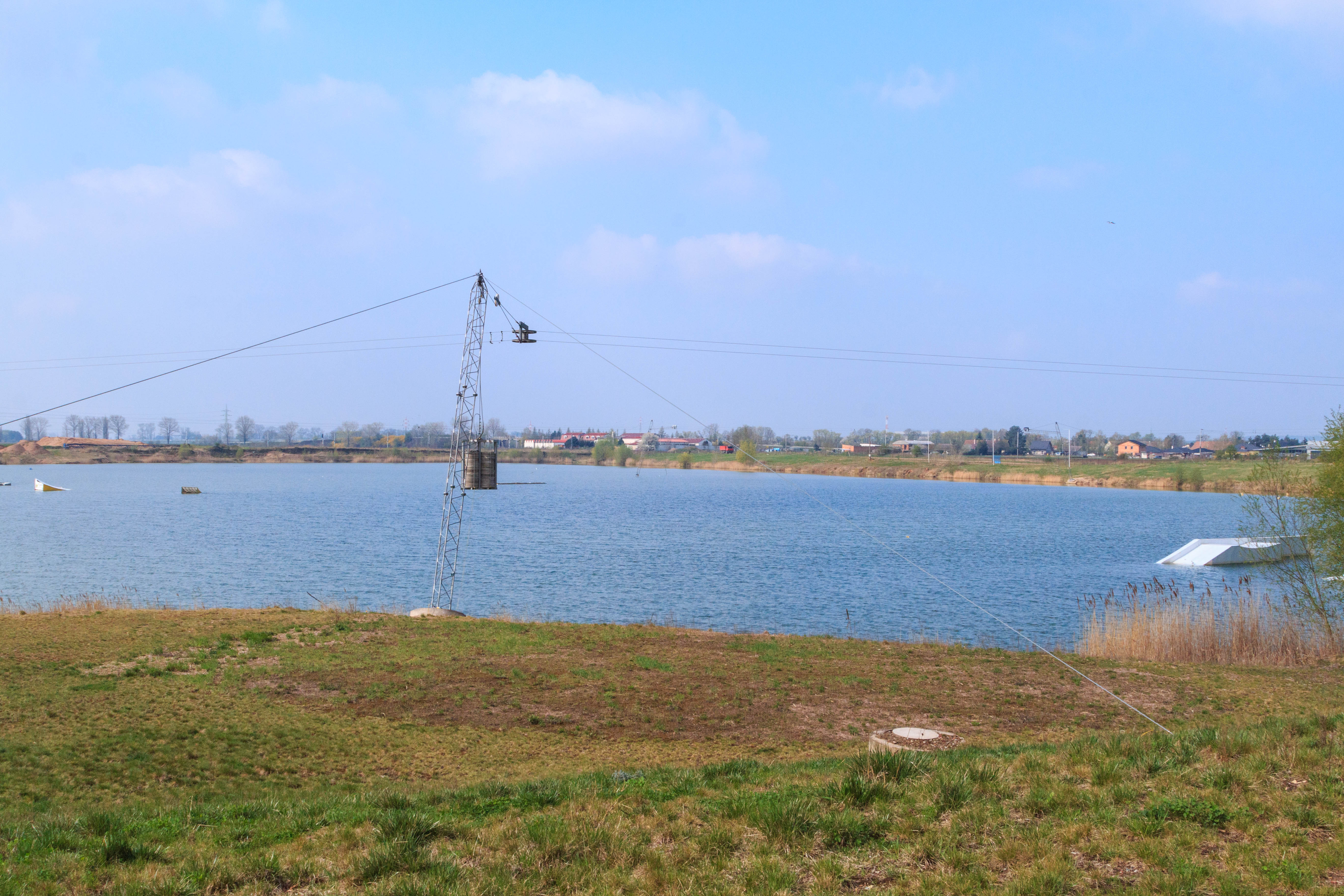 Písník Dubina u Plačic Project: Vodstvo.